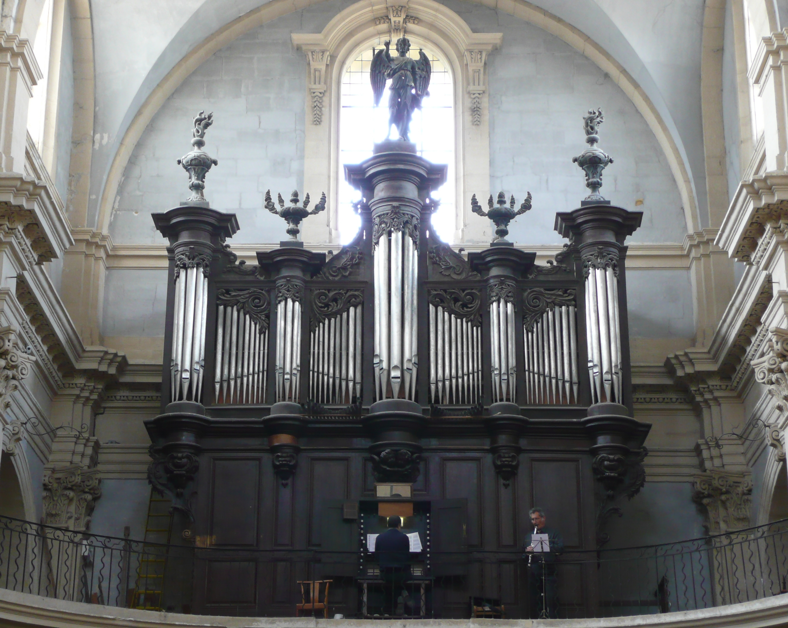 Vue générale de l'orgue de Notre-Dame de l'Assomption à Lambesc (Bouches-du-Rhône, France), construit de 1788 à 1790 par Joseph Isnard, neveu du grand Jean-Esprit.